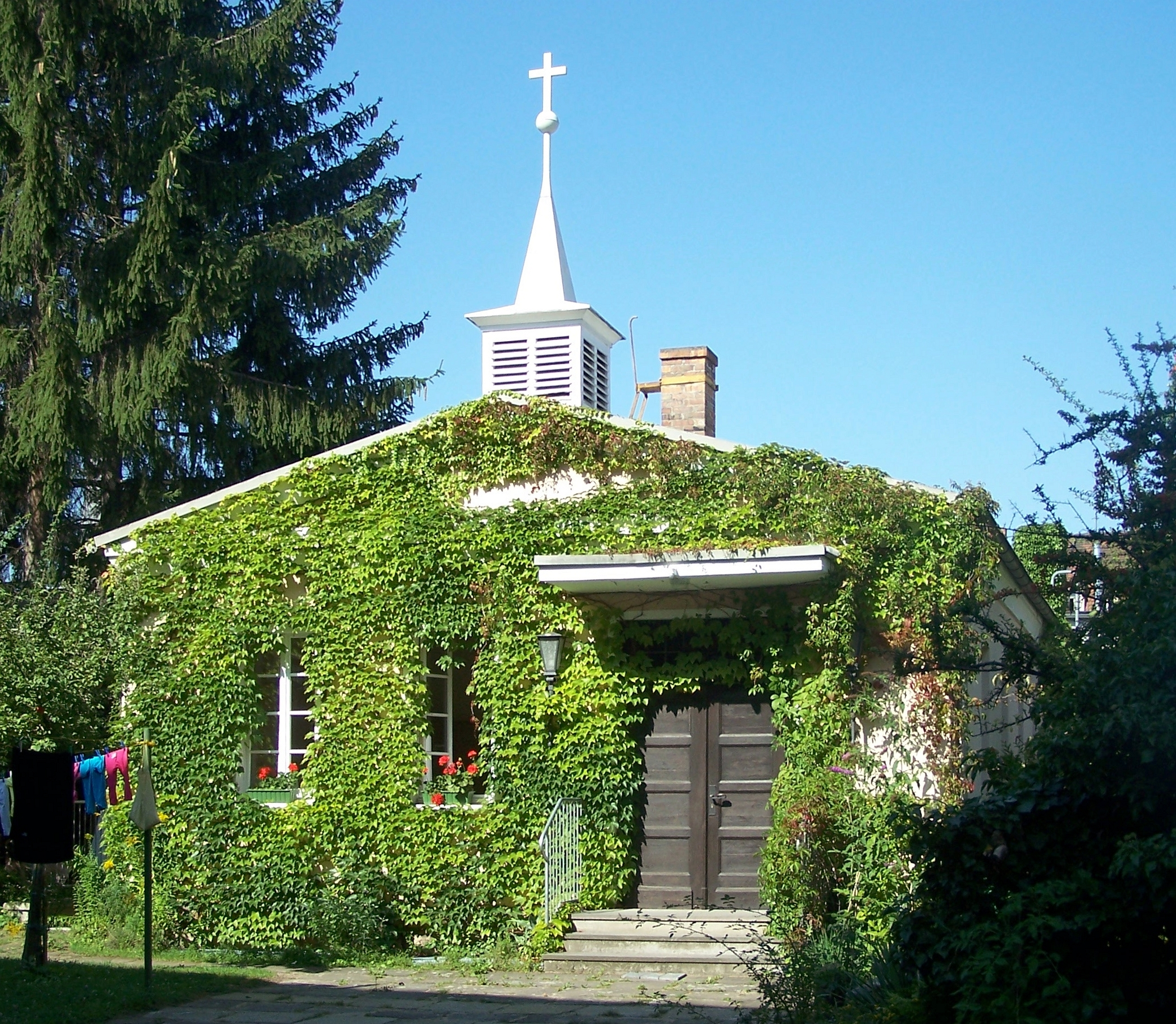 Kirche der Herrnhuter Brüdergemeine in Dresden, Oschatzer Str. 41